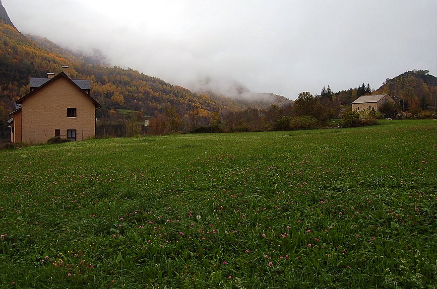 Aragonés: Prau en Pandicosa